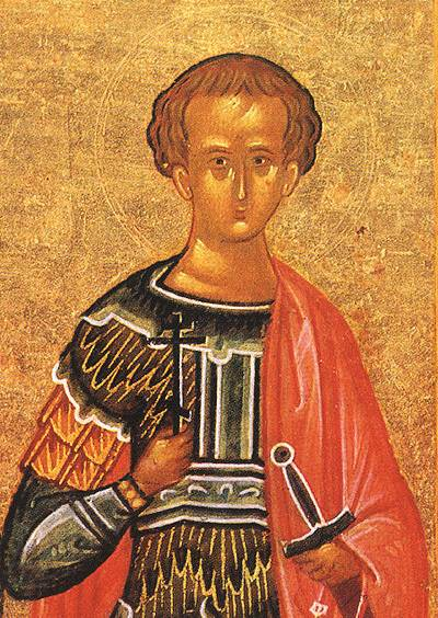 Saint Polyeuctus